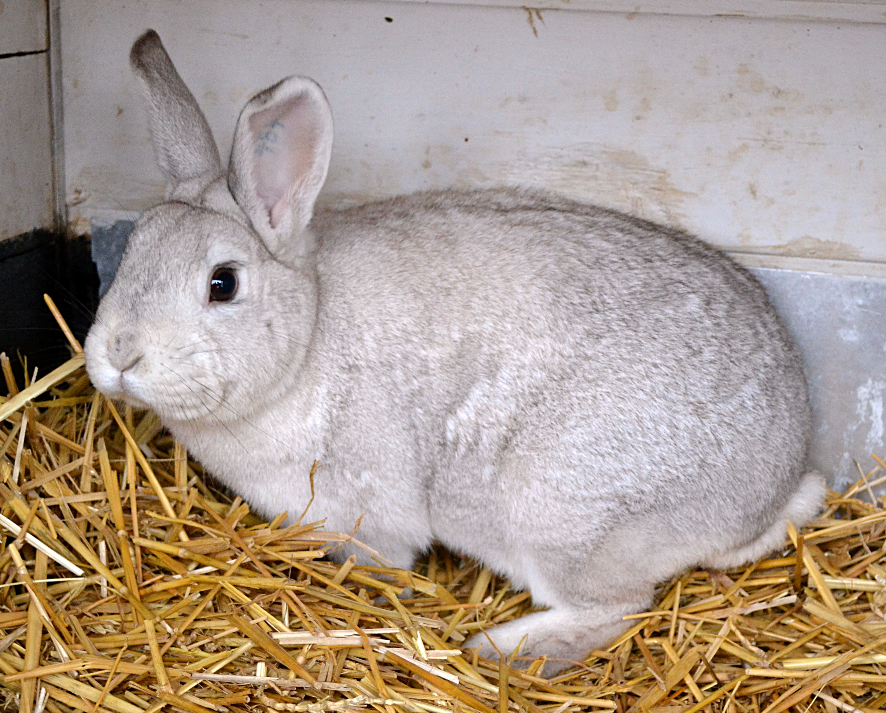 Schwarzkrannenkaninchen im Stall